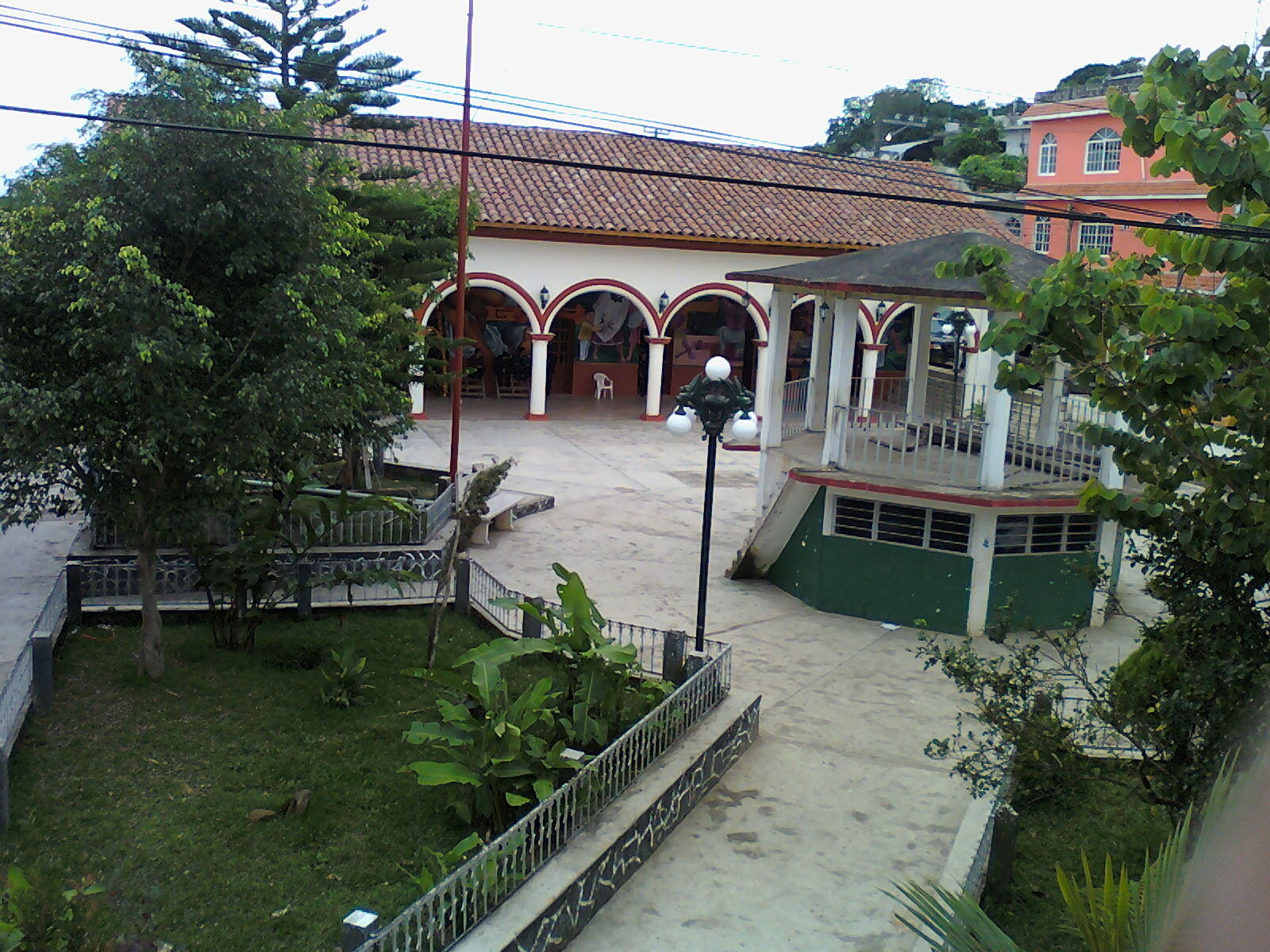 Fotografia donde se puede observar, el parque y el palacio municipal en el centro de Mecatlán, Veracruz, México